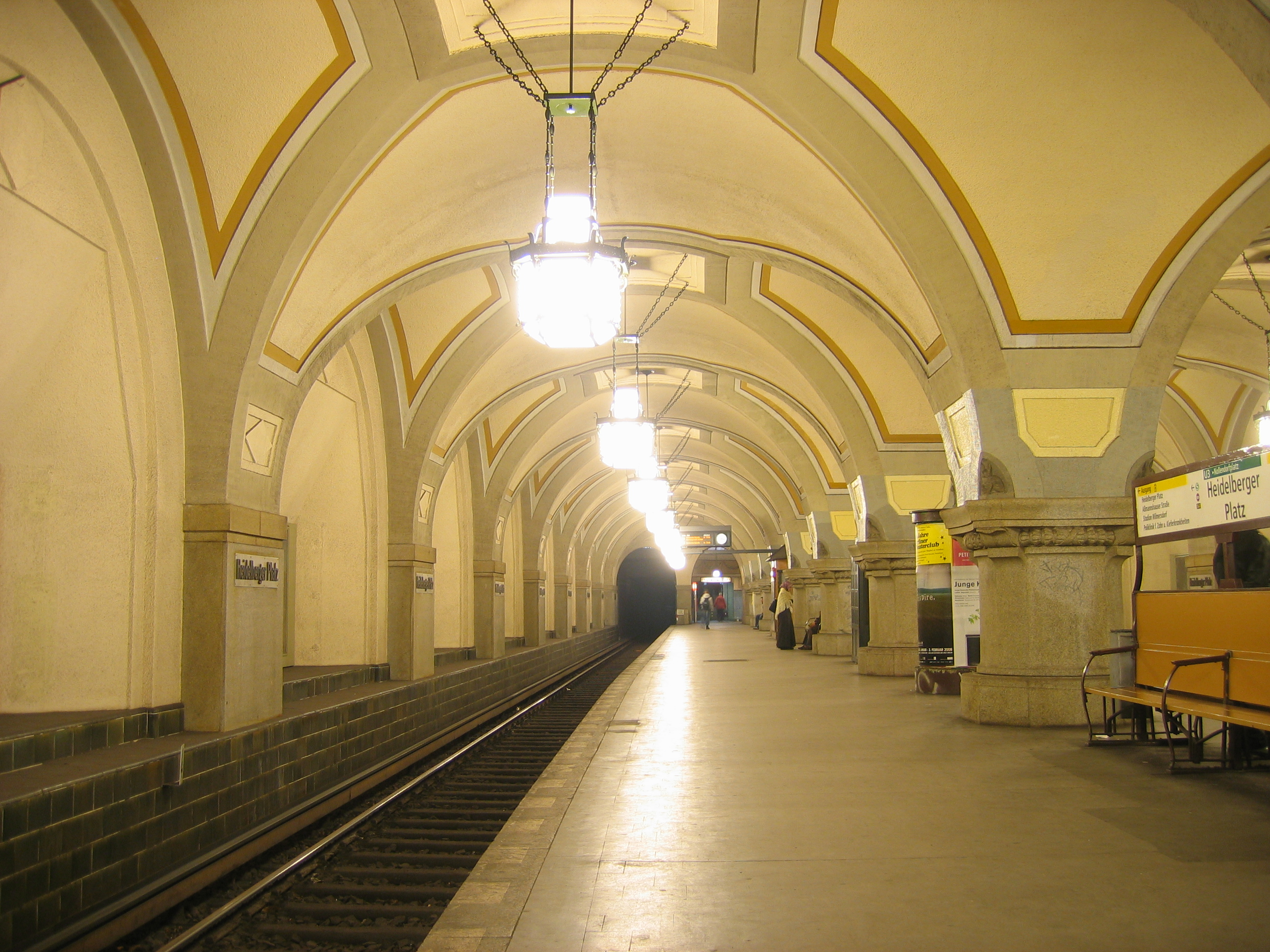 Der U-Bahnhof Heidelberger Platz in Berlin